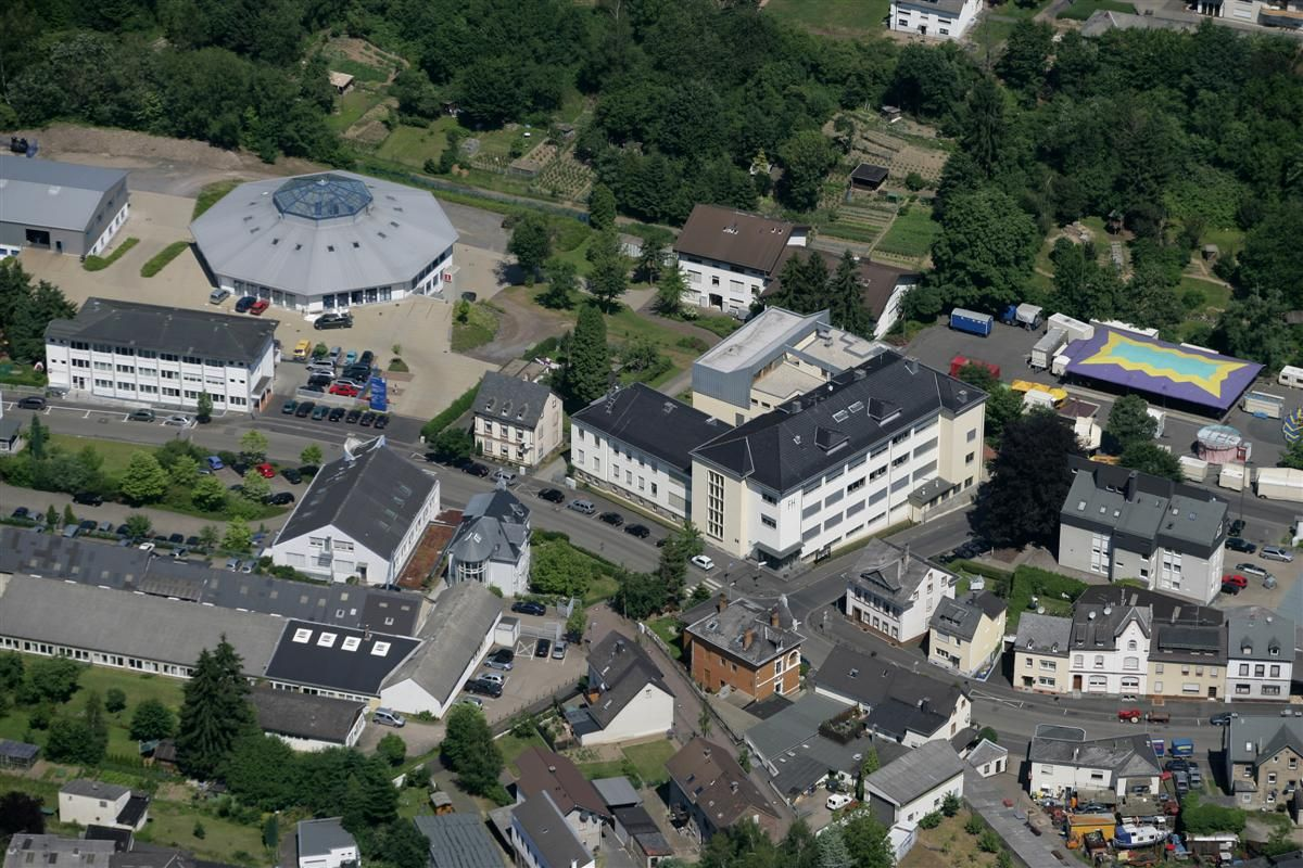 WesterwaldCampus von oben